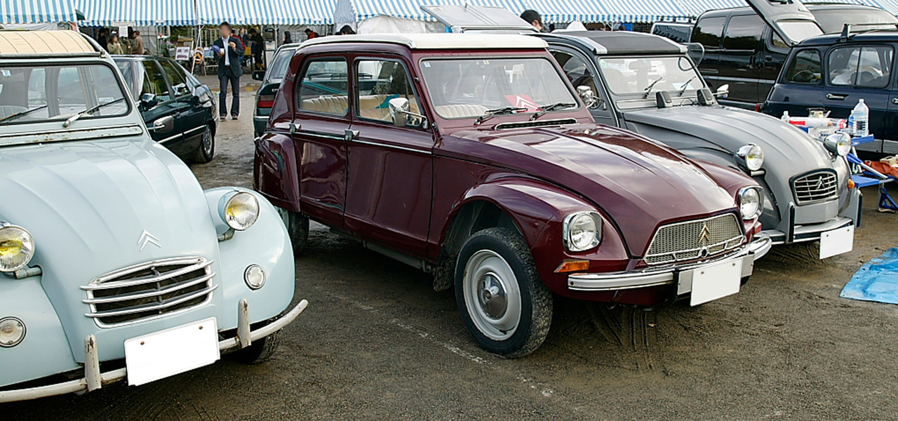 Citroën Dyane